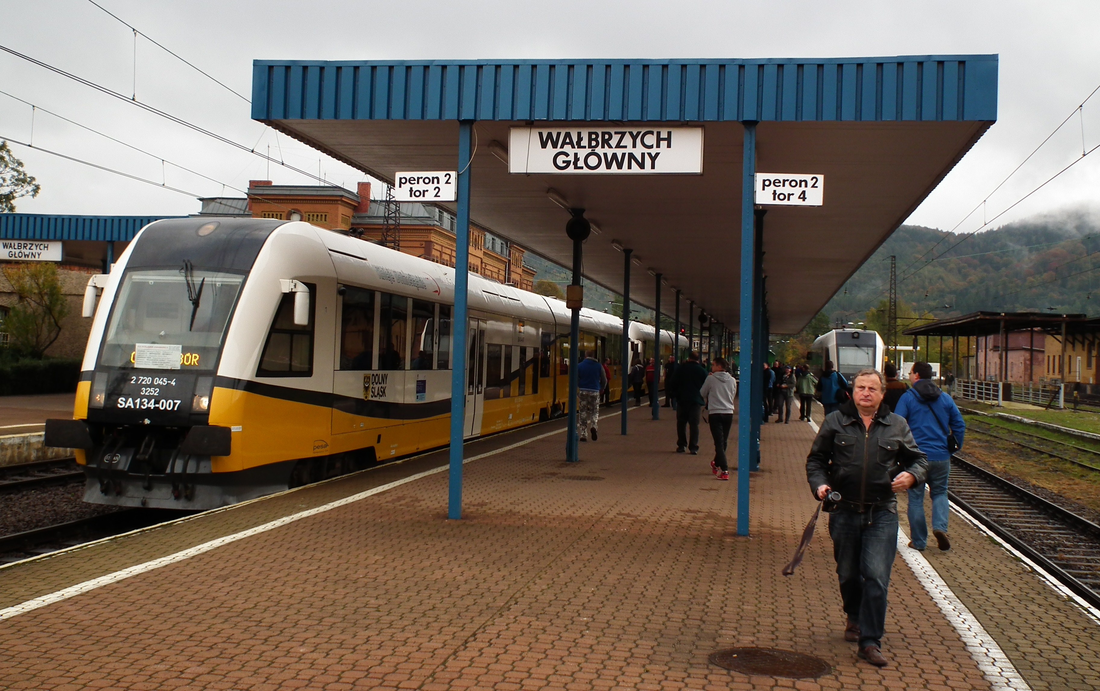 Impreza kolejowa Dolnośląskie Zakamaeki II w dniu 17 października 2015r. na liniach kolejowych Dolnego Śląska. Skład pociągu złożony z SA134-003 i SA134--007. Wałbrzych Gł.